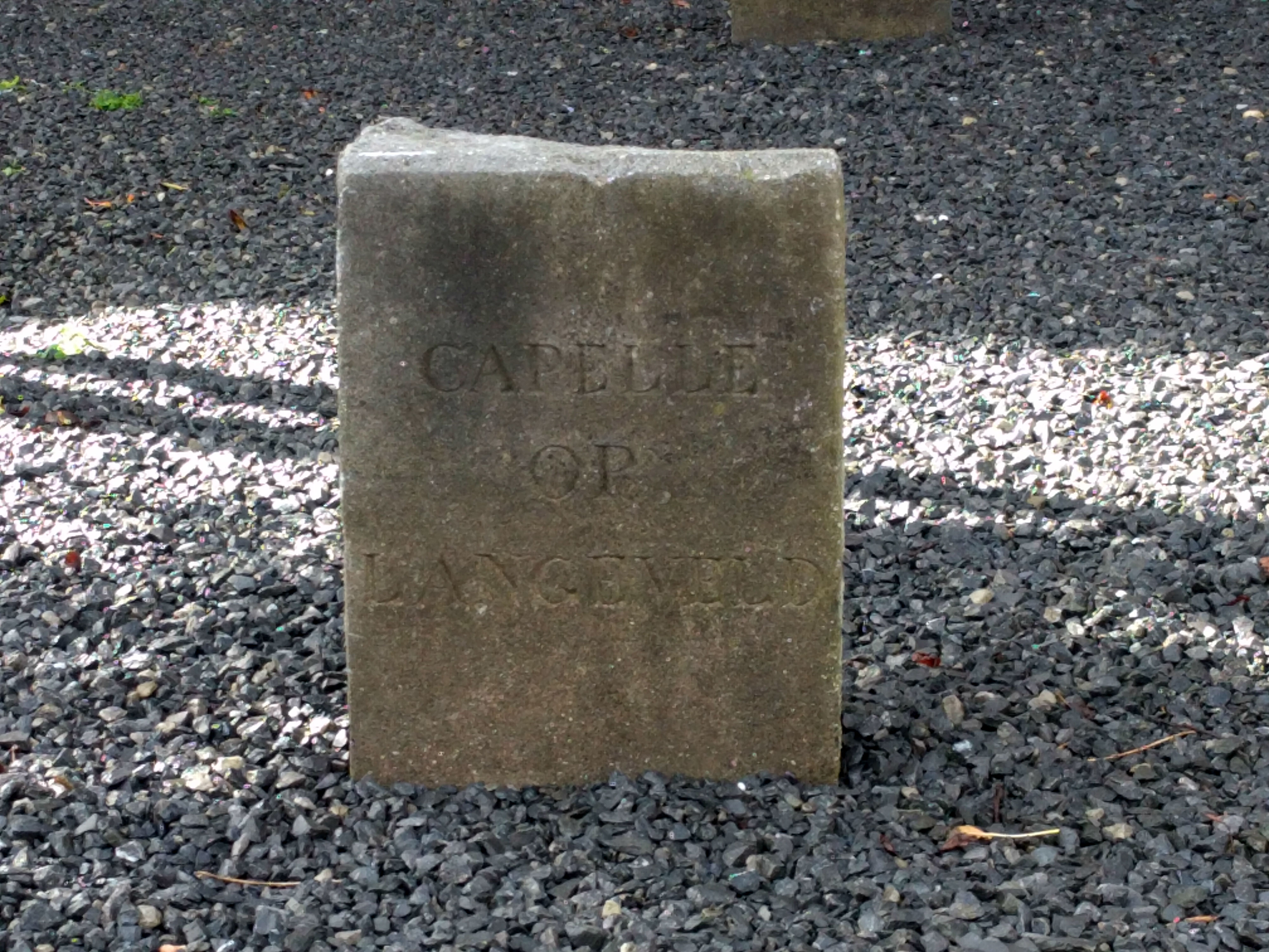 IMG 20170909 1Noordwijk - Maria ter Zeekerk - zuil2